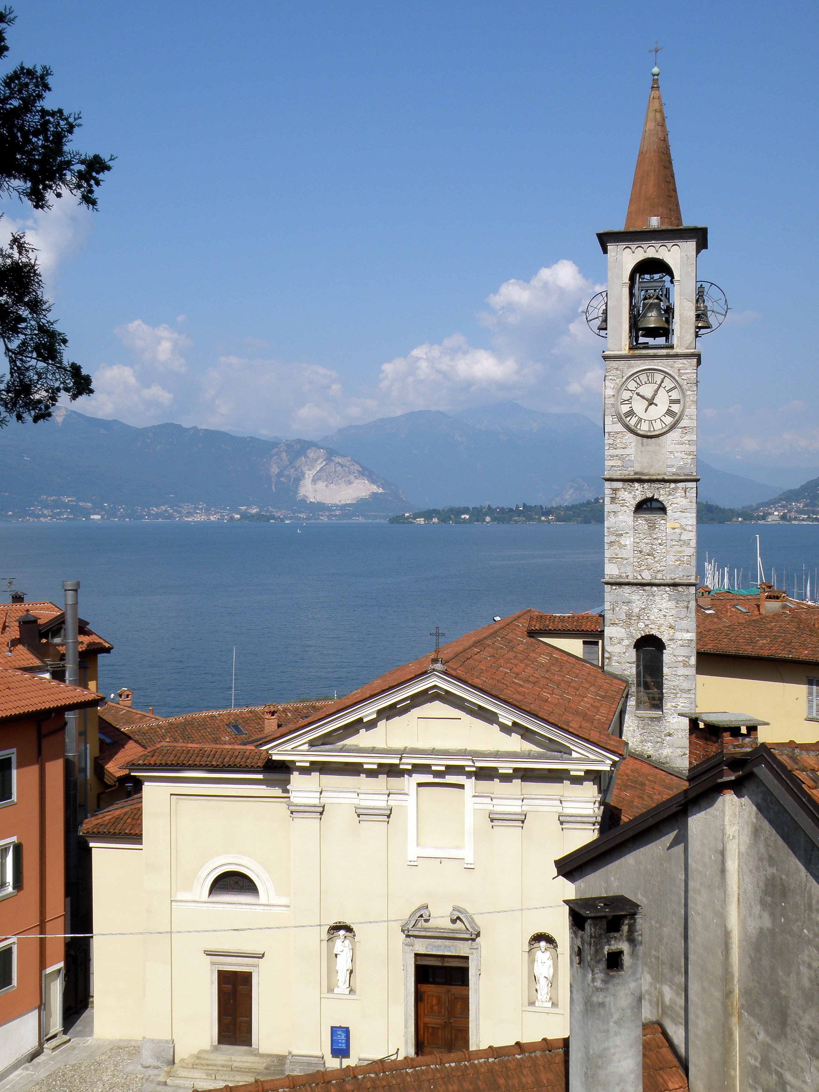 Laveno-Mombello (VA). Chiesa parrocchiale di San Filippo e Giacomo, detta Chiesa Vecchia.